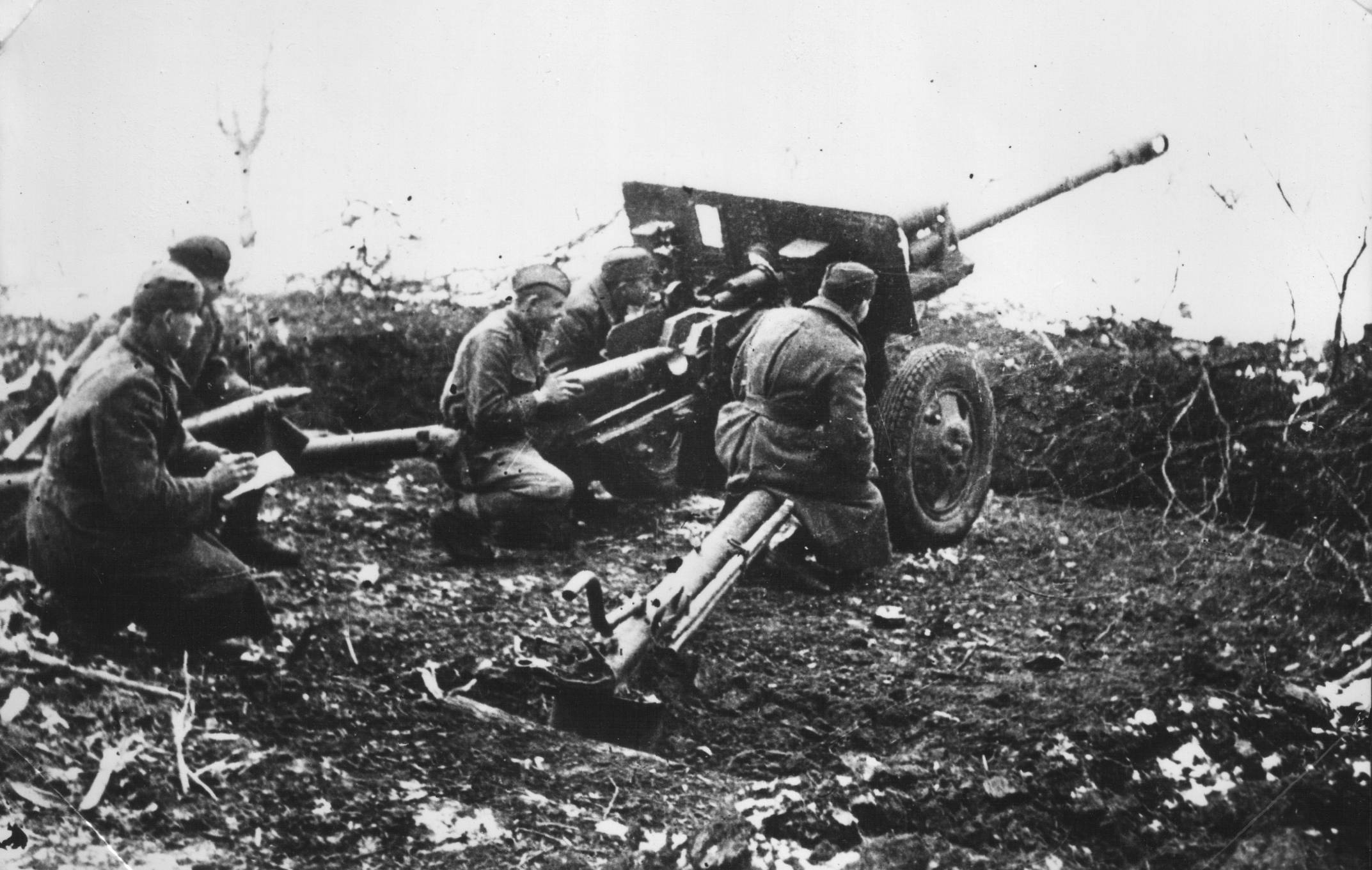 Artiljerija 6. ličke divizije na Sremskom frontu 1945. godine